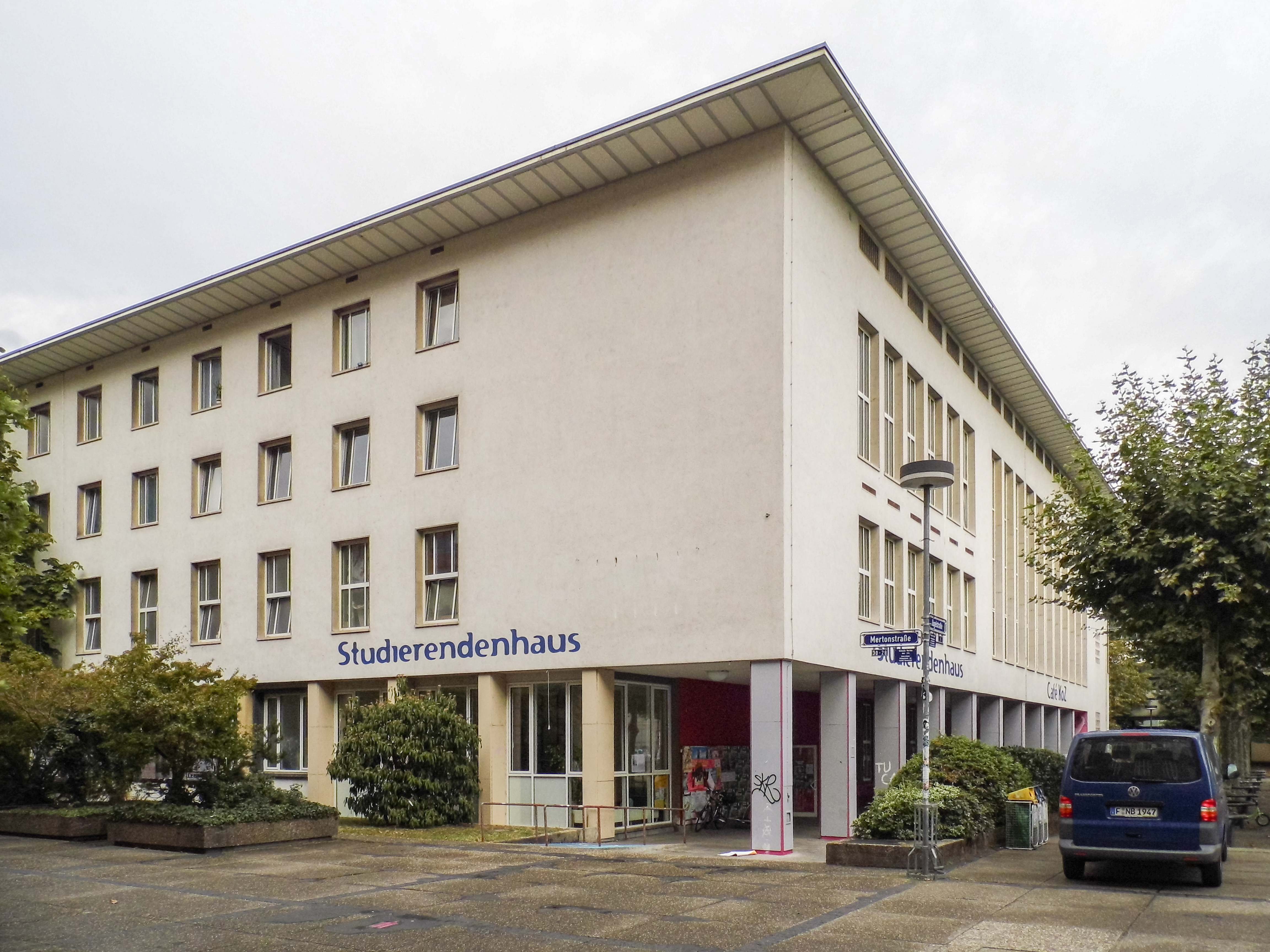 Frankfurt, Studentenhaus Mertonstraße